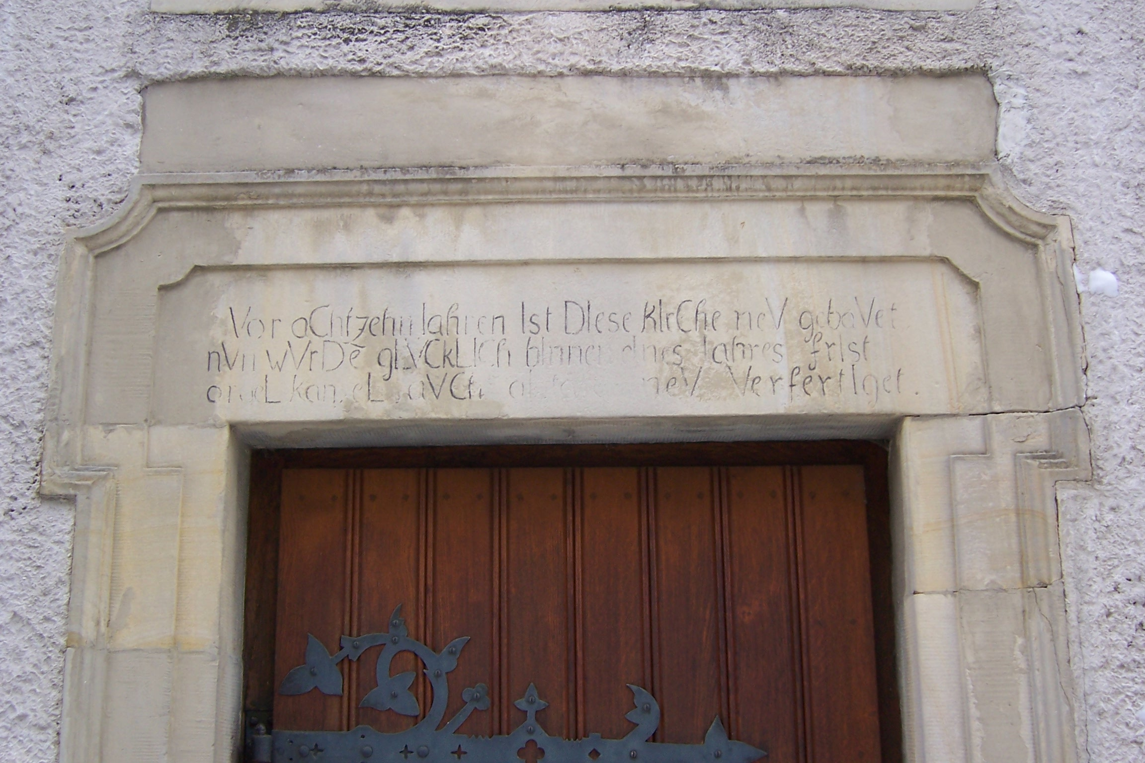 Chronogramm über dem Türsturz des Südeingangs von St. Marien Laer Holthausen Kreis Steinfurt NRW.